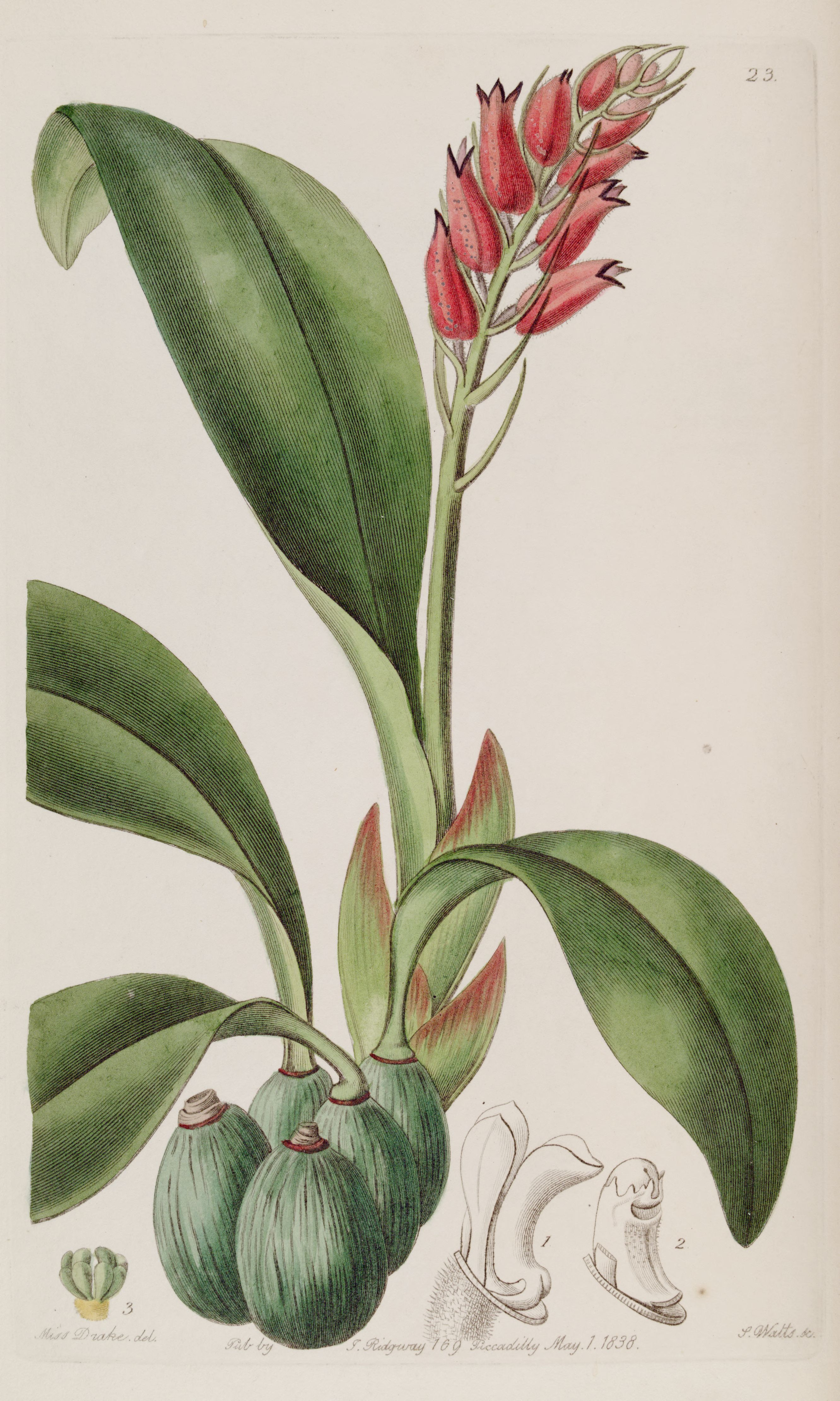 Cryptochilus sanguineus